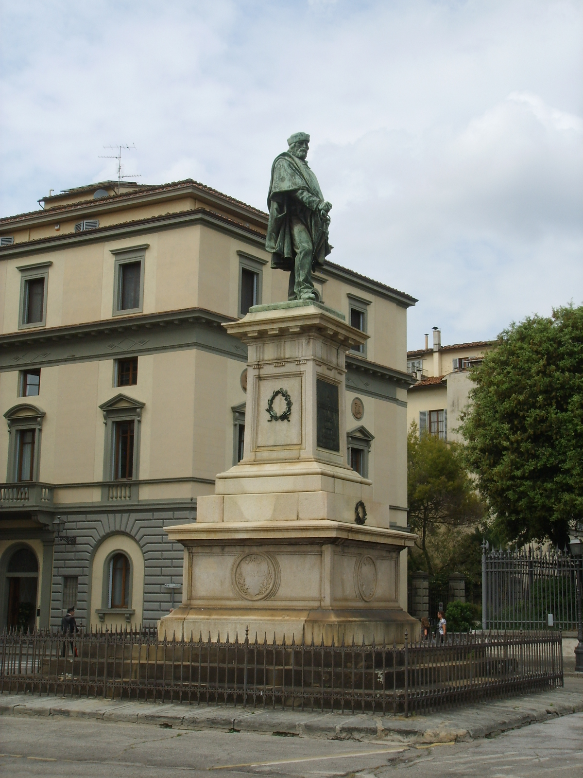 Cesare Zocchi, Monumento a garibaldi, lungarno vespucci, Firenze.